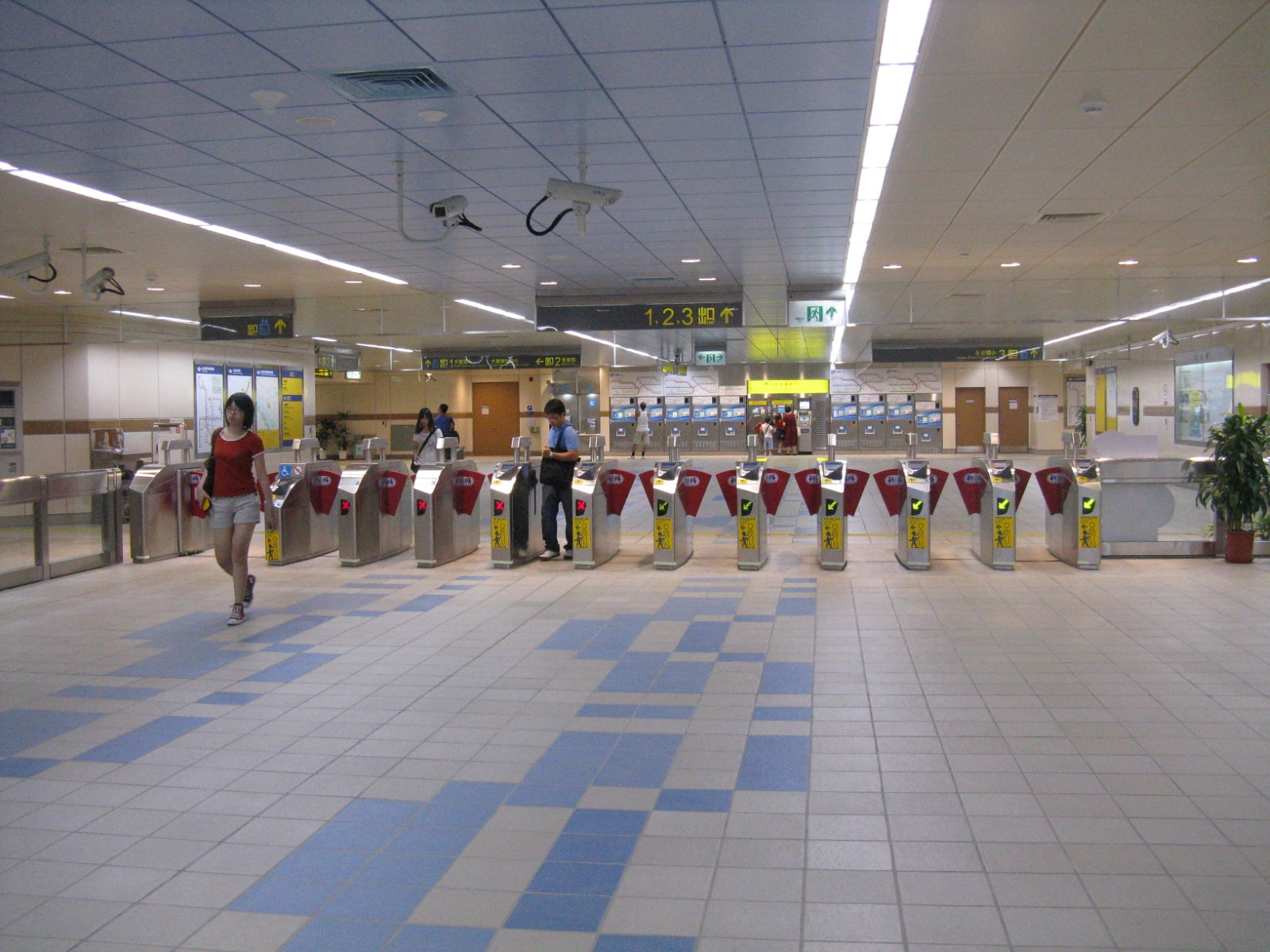 台北捷運内湖線大直駅の改札口。